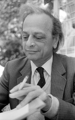 Lengyel Balázs portréja